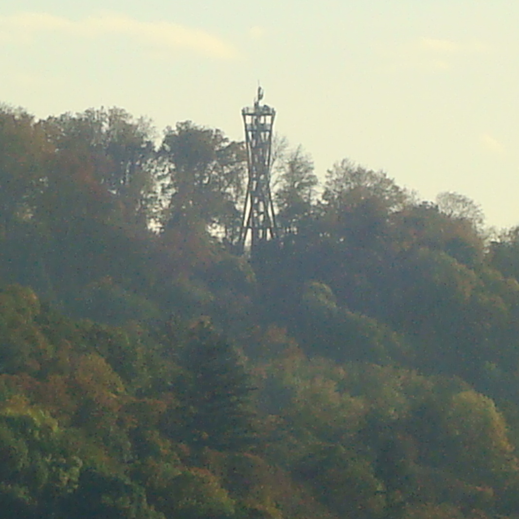 Der Schlossbergturm (Aussichtsturm auf dem Freiburger Schlossberg) von der Eichhalde aus gesehen.